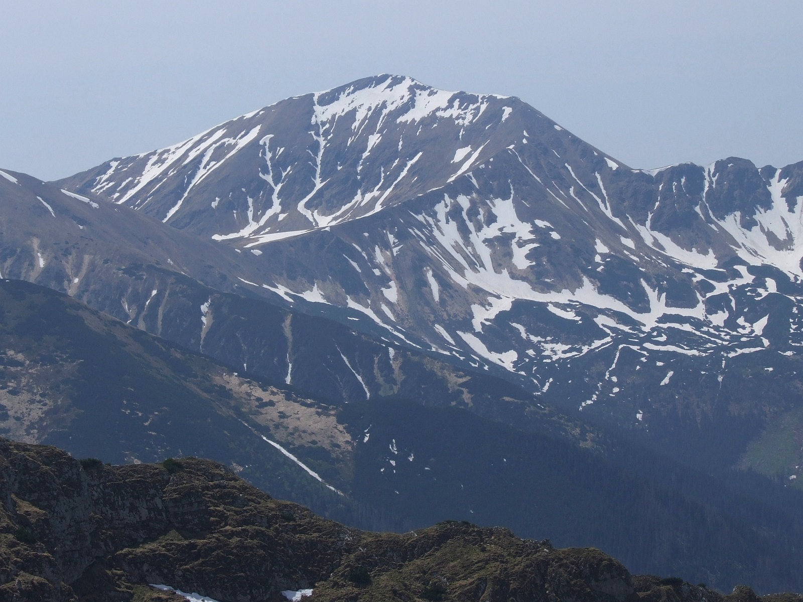 Błyszcz i Bystra, widok z Ciemniaka